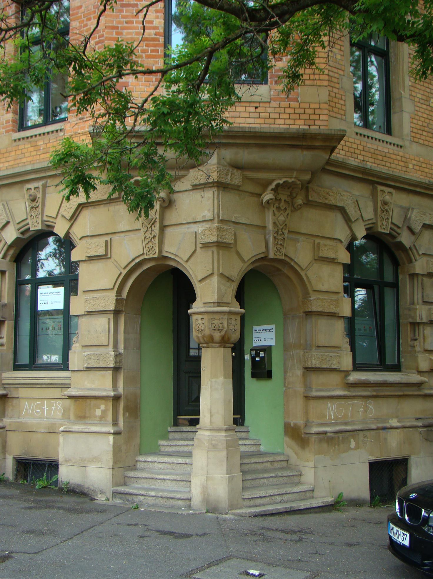 Heilbronn, Charlottenstraße 2, ehem. Metro Bar